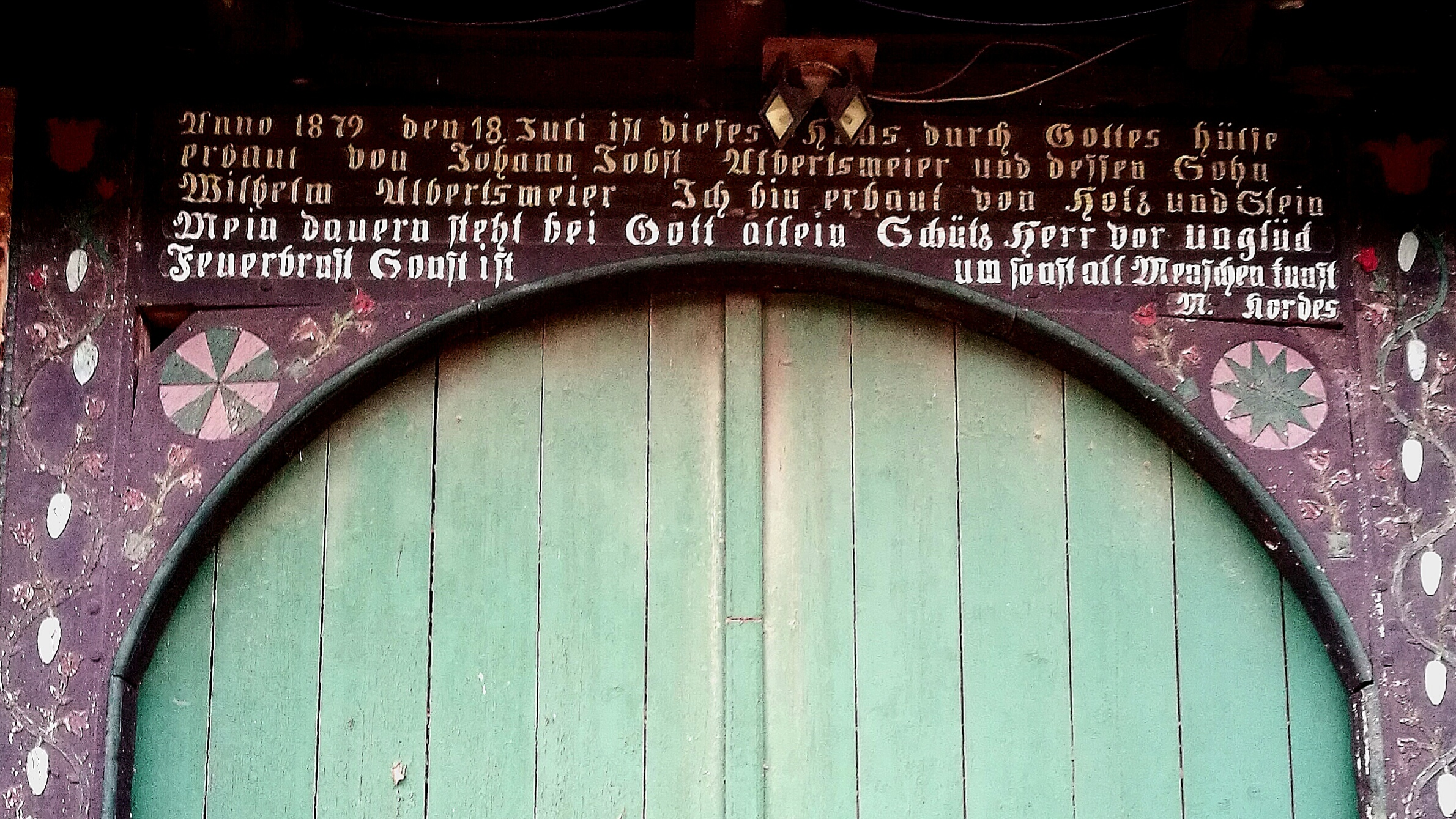 Deutschland (D) - Nordrhein-Westfalen (NW) - Kreis Lippe (LIP) - Bad Salzuflen - Wüsten: Hofanlage Albertsmeier, Torbogen der Leibzucht